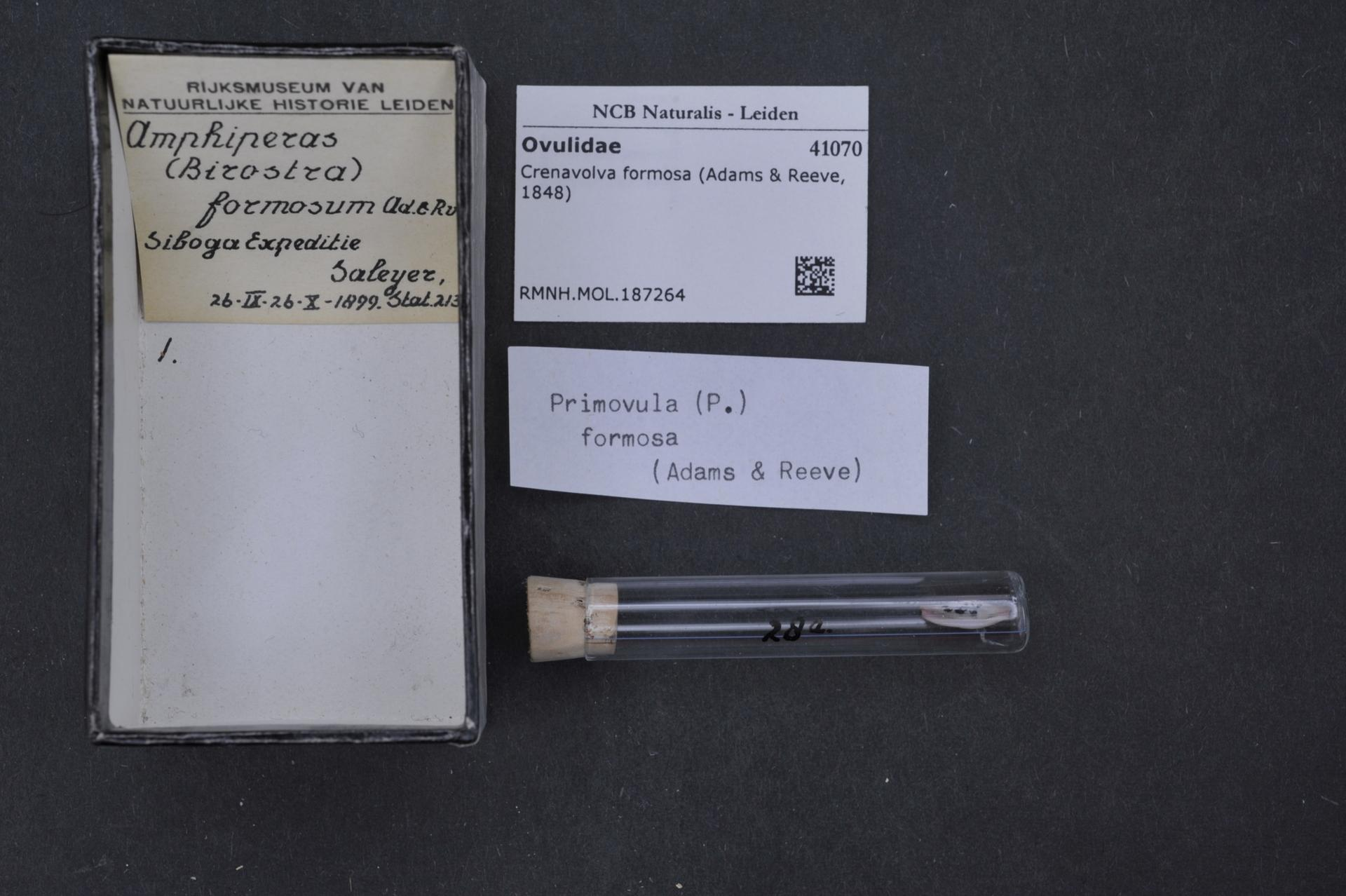 Crenavolva traillii (A. Adams, 1855) (synonym: Crenavolva formosa (Adams & Reeve, 1848) )